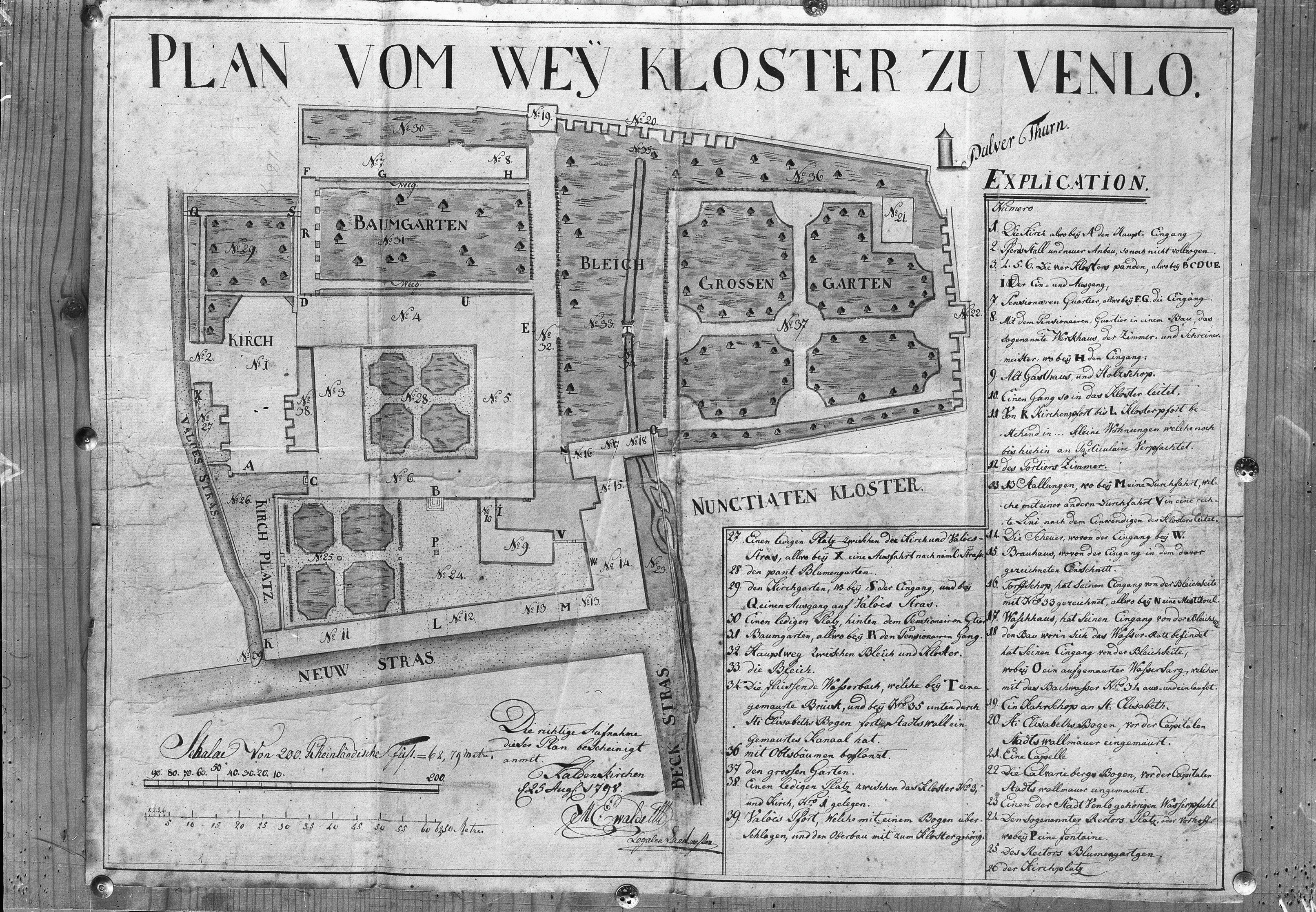 Klooster Mariaweide: Plattegrond naar tekening van 1798, in het bezit van Mej.Berger (opmerking: Fotonummer 12860a)